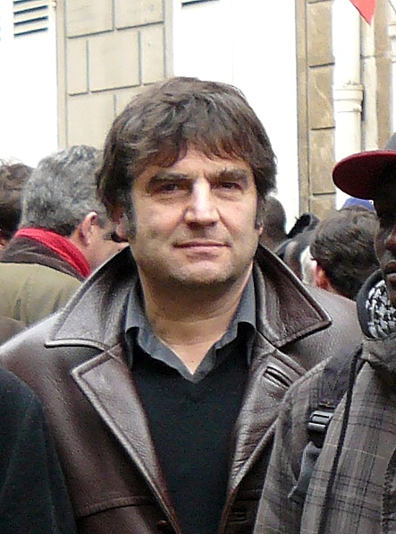 Romain Goupil lors d'un rassemblement de soutien aux travailleurs sans-papiers en grève à Paris (détail).